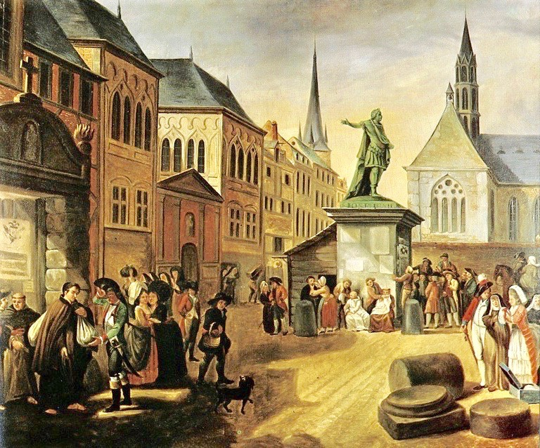 Léonard Defrance (1735–1805): Aufhebung von Klöstern durch Joseph II. (Kopie nach verlorenem Original von 1782), Musée communal, Herstal. Im Hintergrund fiktives Standbild des Kaisers als römischer Imperator.